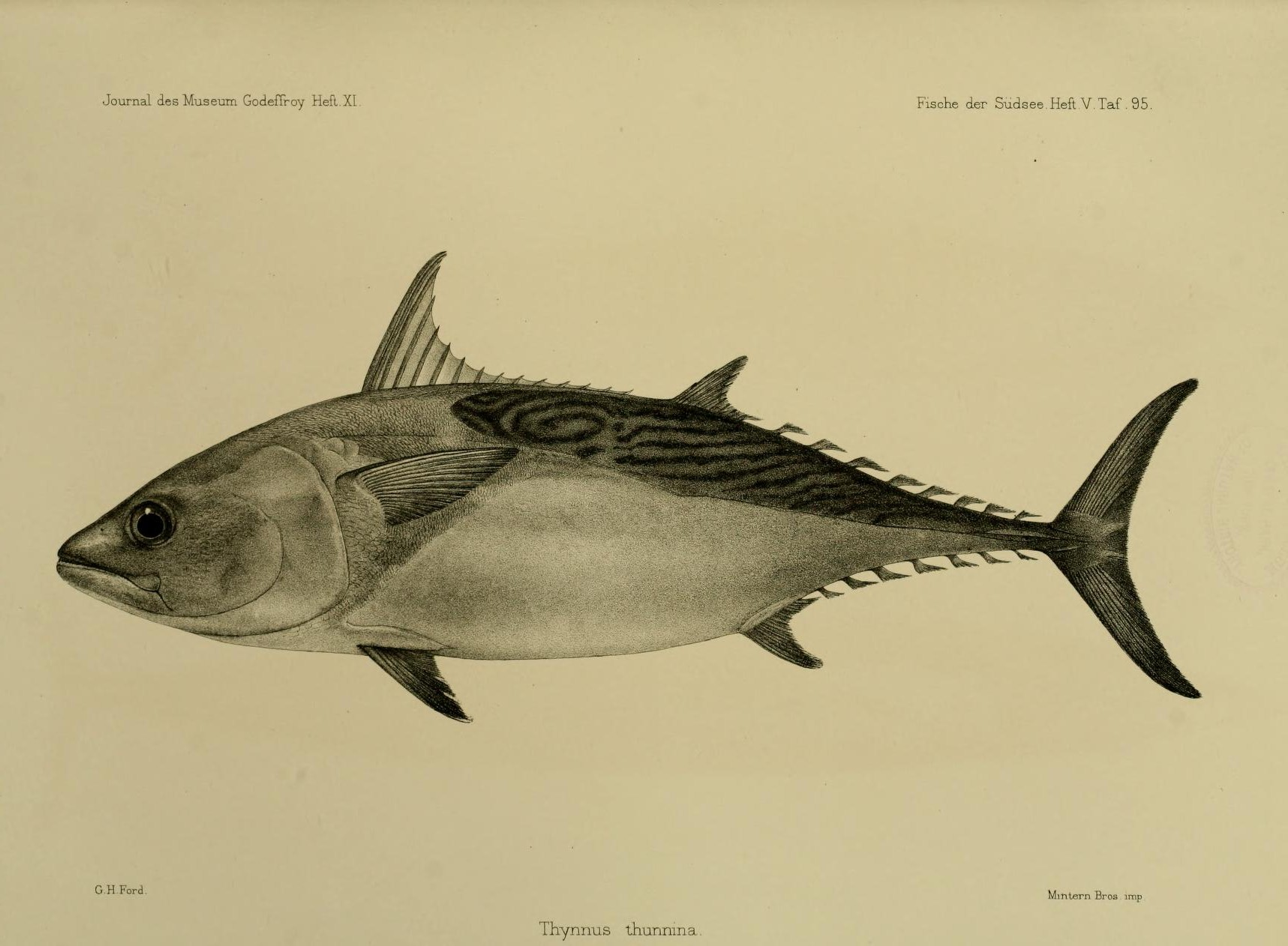 Euthynnus alletteratus syn. Thynnus thunina